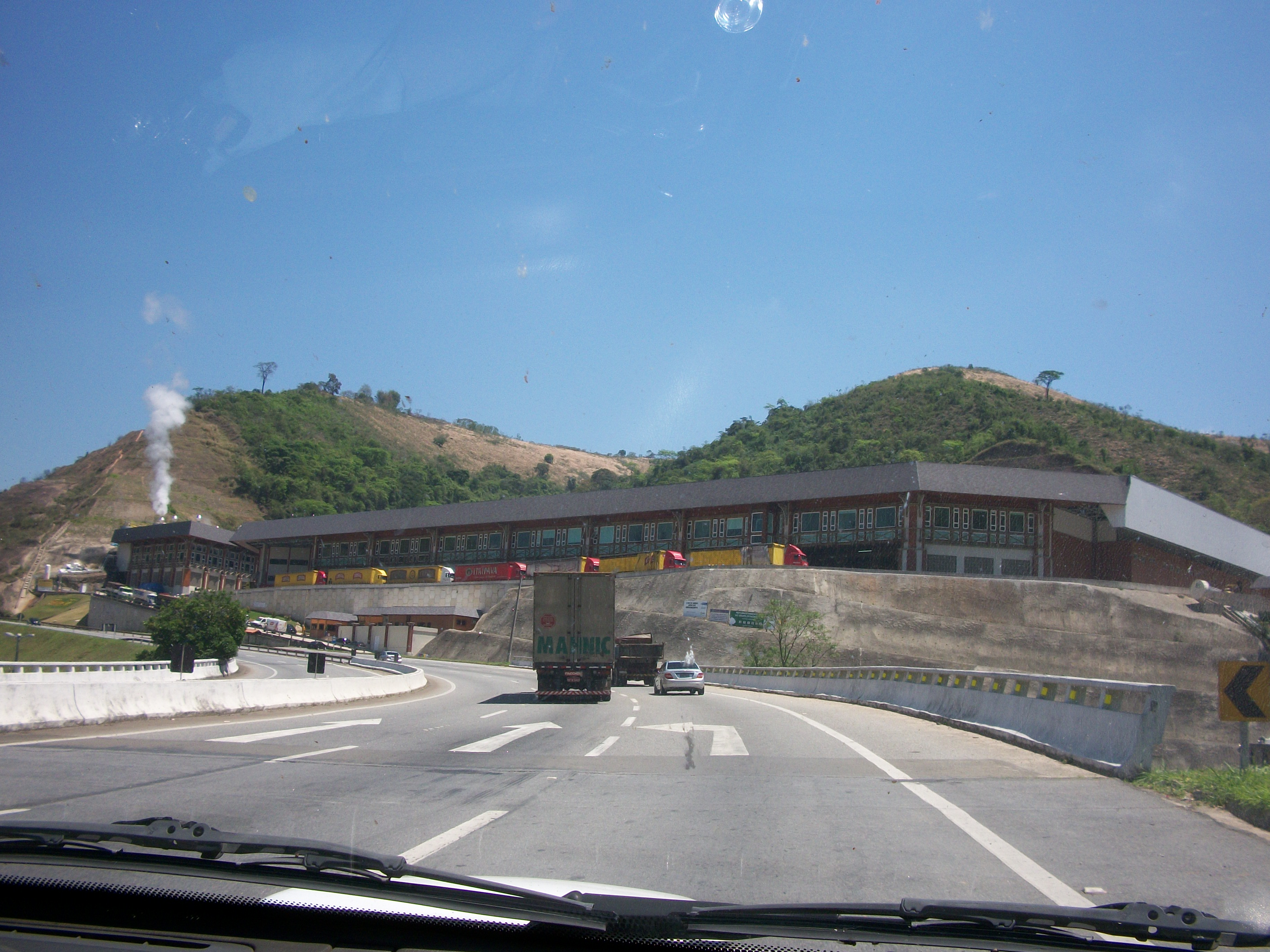 Fachada da cervejaria Itaipava em Pedro do Rio, Petrópolis, RJ, Brasil.